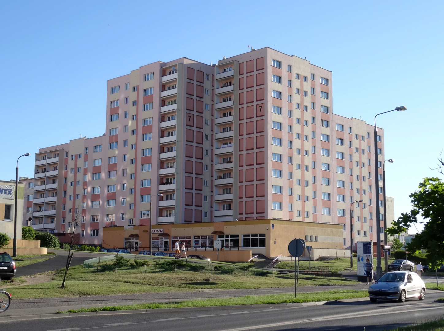 Osiedle Przylesie w Fordonie